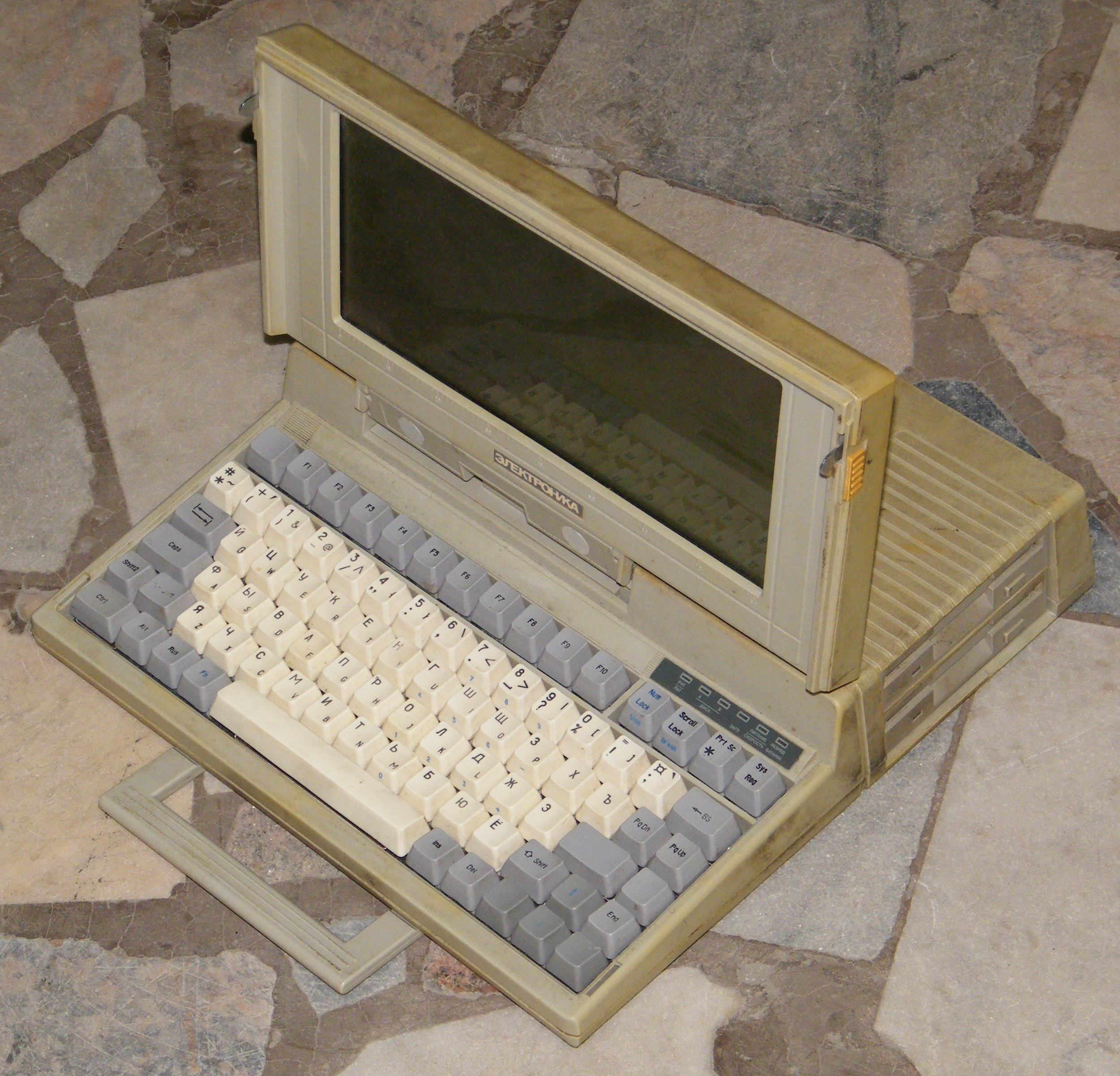 Теплый ламповый звук